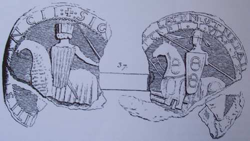 Sceau de Nuno Sanche (Nugnez Sanche d'Aragon), comte de Roussillon publié dans l' Histoire du Languedoc, de Dom Vaisette, 1745 i per Borel d'Auterive. Annuaire de la Noblesse, 1844 però erreur inexplicable de l'auteur de l'Annuaire de la Noblesse, signalant les armoiries attribuées au comte Gérard de Roussillon: "deux fermaux ... posés en pal". Il portait, suivant un sceau reproduit dans l'histoire de Languedoc par Dom Vaissète, de .... à deux fermaux de ... pasés en pal. Les armes indiquées ici ne sont pas celles de ce comte, Gérard, comte de Rousillon, mourunt en 1113. Le sceau qu'on lui prete est celui de Hugues (sic pro:Nugnez) Sanche d'Aragón, qui était comte de Roussillon en 1235.